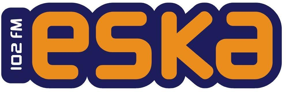 Polskie radio